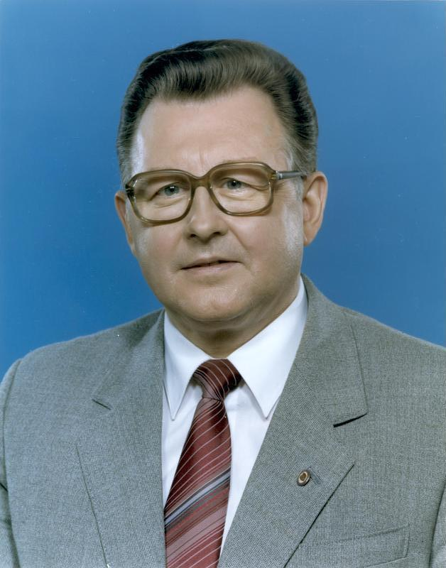 ADN-ZB/Dewag/24.4.86 Berlin: Hans-Joachim Böhme, Mitglied des Politbüros des ZK der SED und 1. Sekretär der Bezirksleitung der SED Halle.